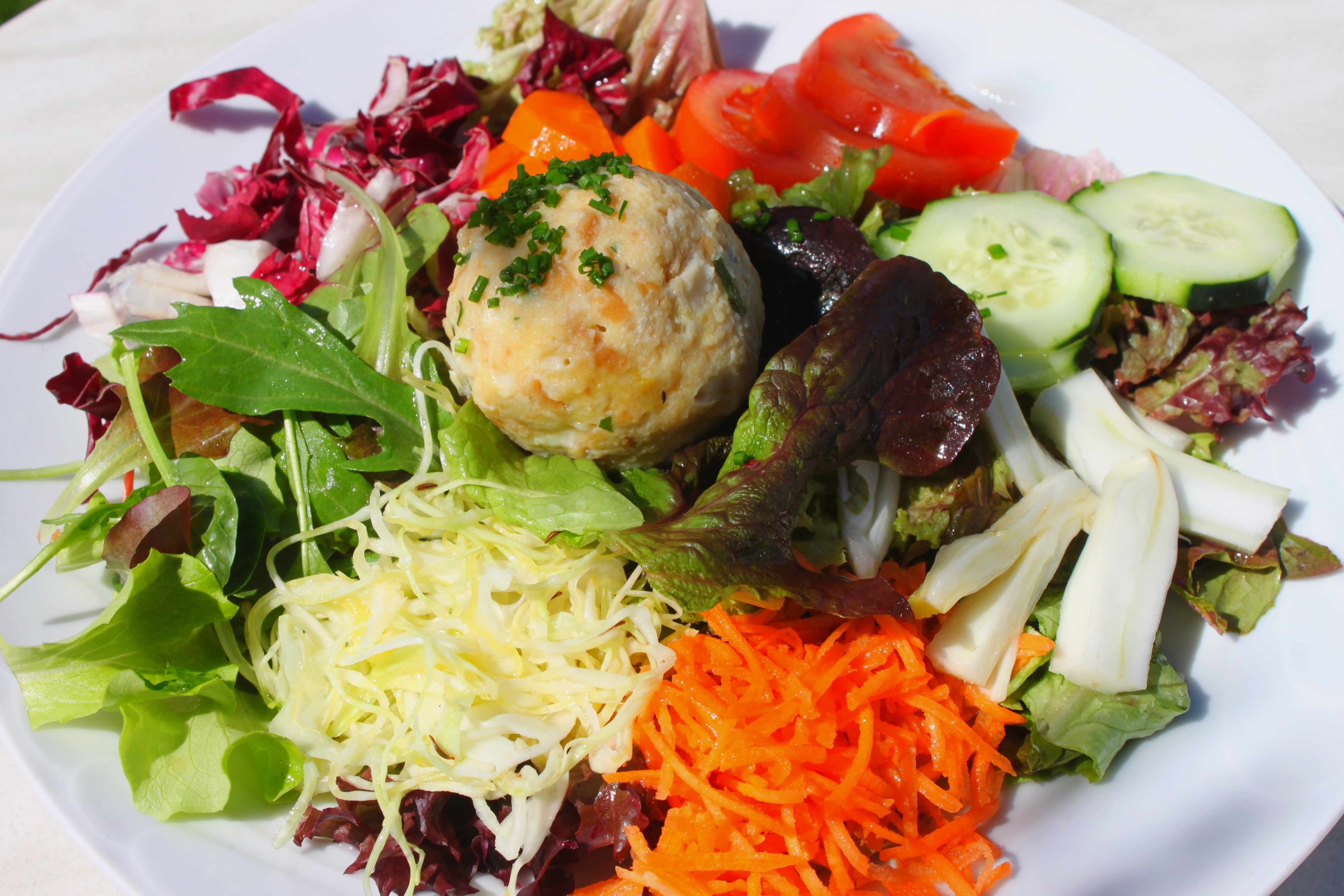 Käseknödel mit gemischten Salat im Haidenhof in Tscherms.